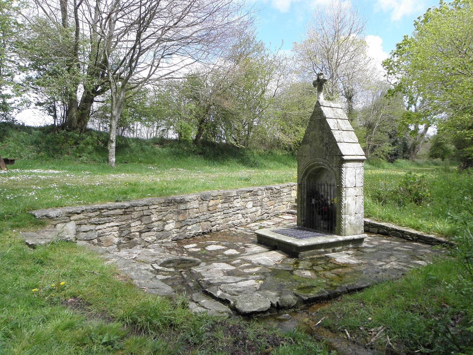 Fontaine de dévotion de la chapelle Notre-Dame-de-Kérinec en Poullan-sur-Mer (29).